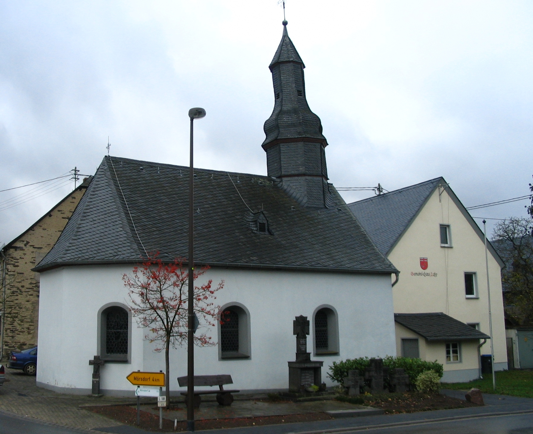 Kirche und Gemeindehaus Lahr im Hunsrück